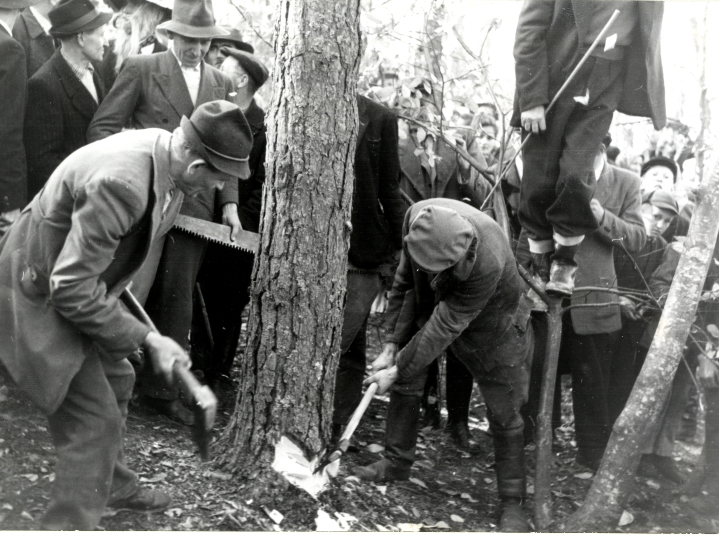 Podiranje Bora.